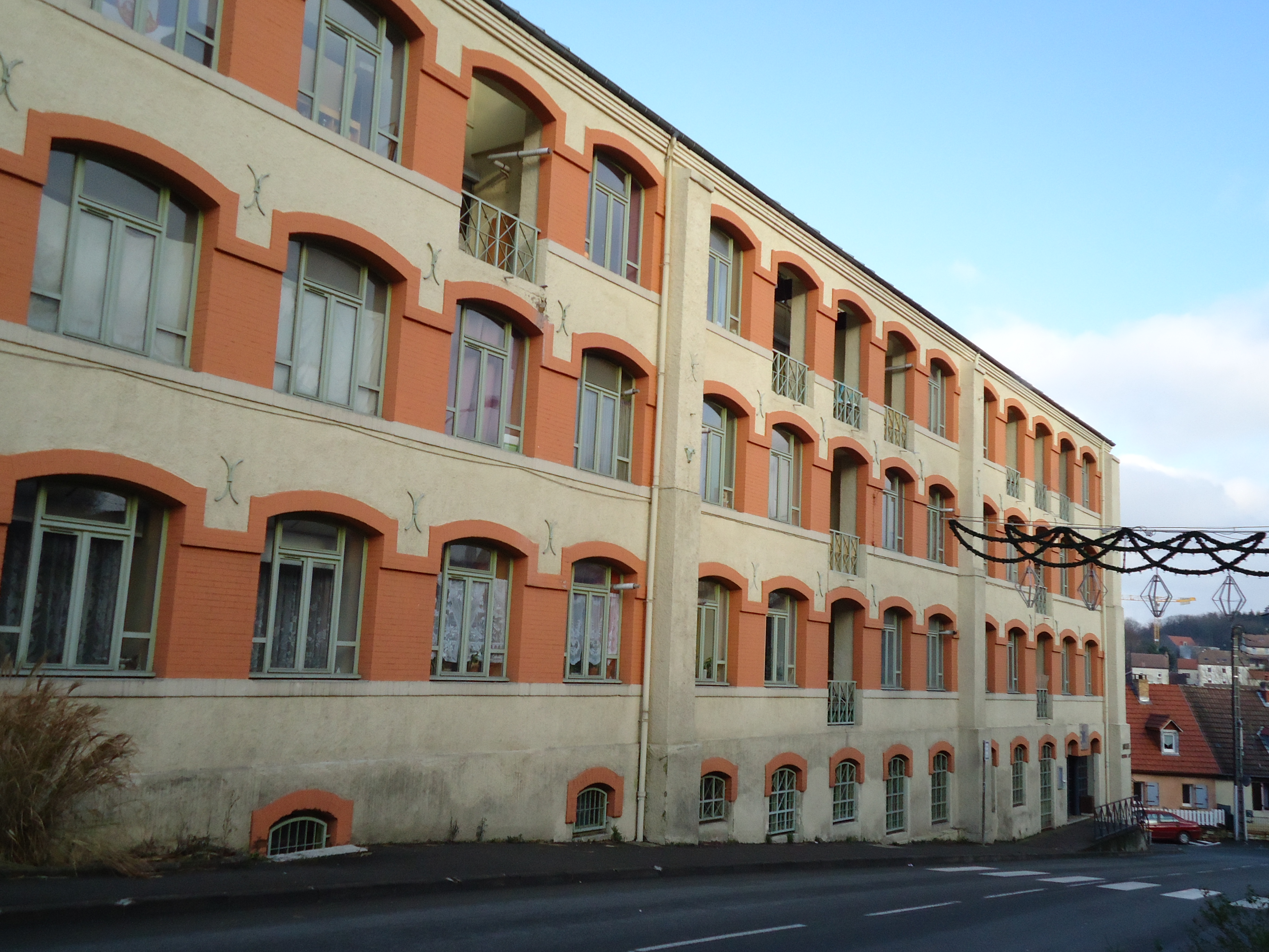 Pendulerie à Beaucourt